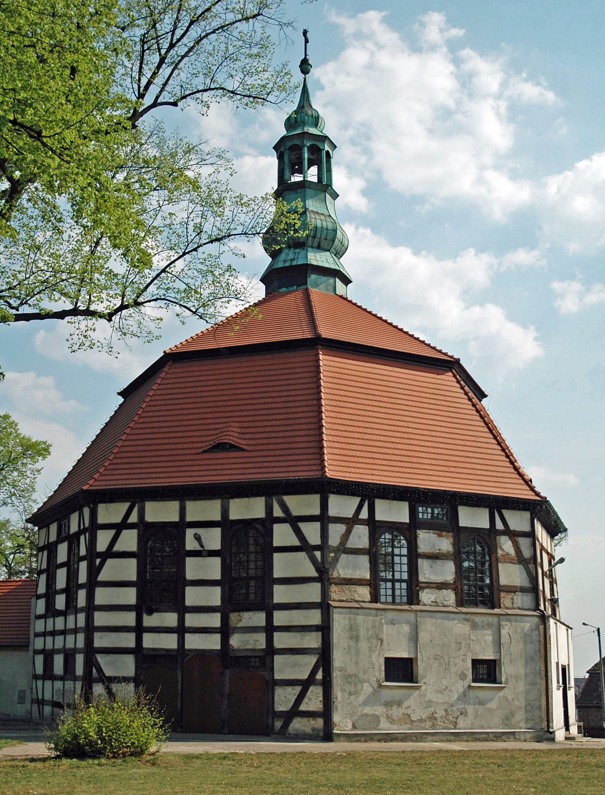 Poland Sulow - MB Czestochowskiej (Madonna of Czestochowa) church.